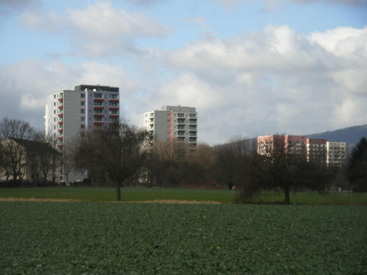 Ansicht "Stadtpanorama"